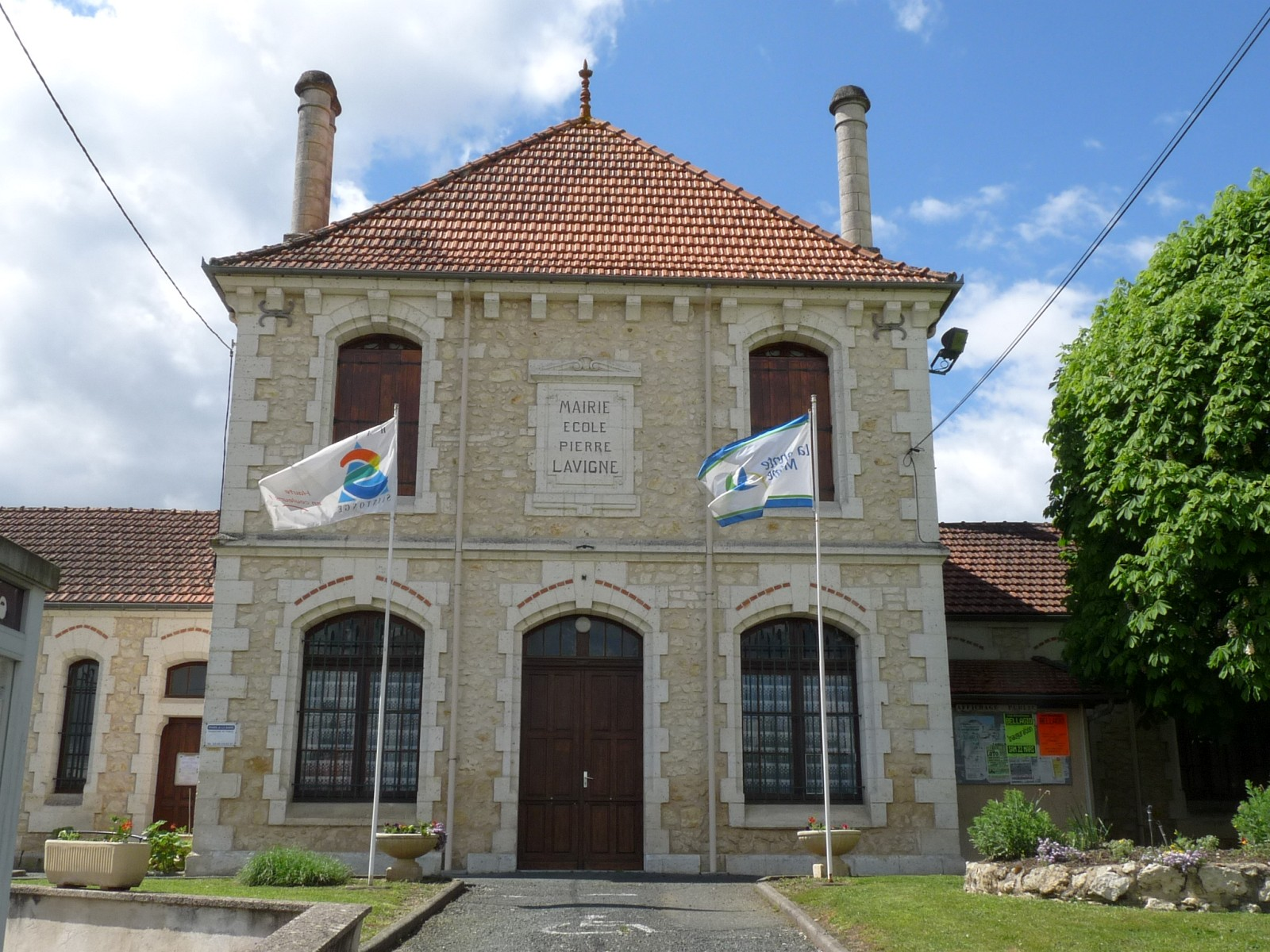 Mairie de La Barde, Charente-Maritime, France